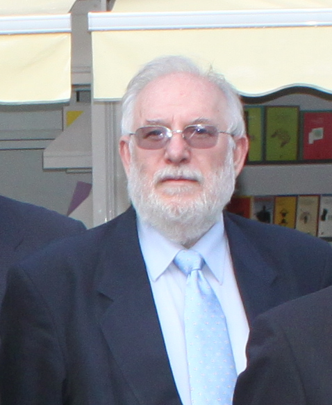 Los rectores de las Universidades Públicas Madrileñas, la UNED y la periodista Paloma Tortajada, 2010, Feria del Libro, Madrid, España.